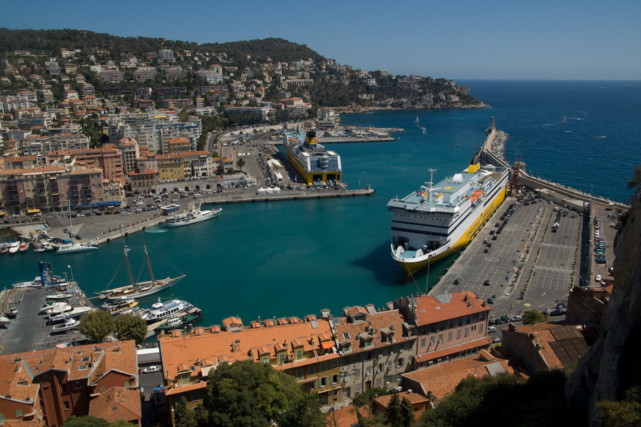 Une partie du port de Nice (France), avec deux ferries à quai reliant Nice à la Corse.